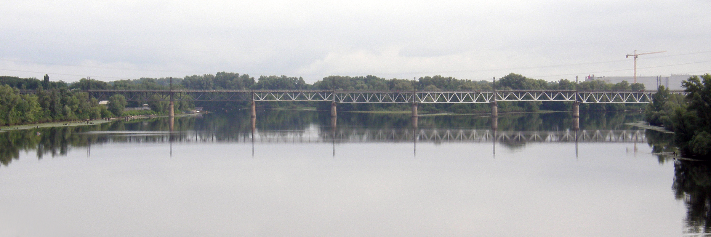 Петровский мост над Десёнкой